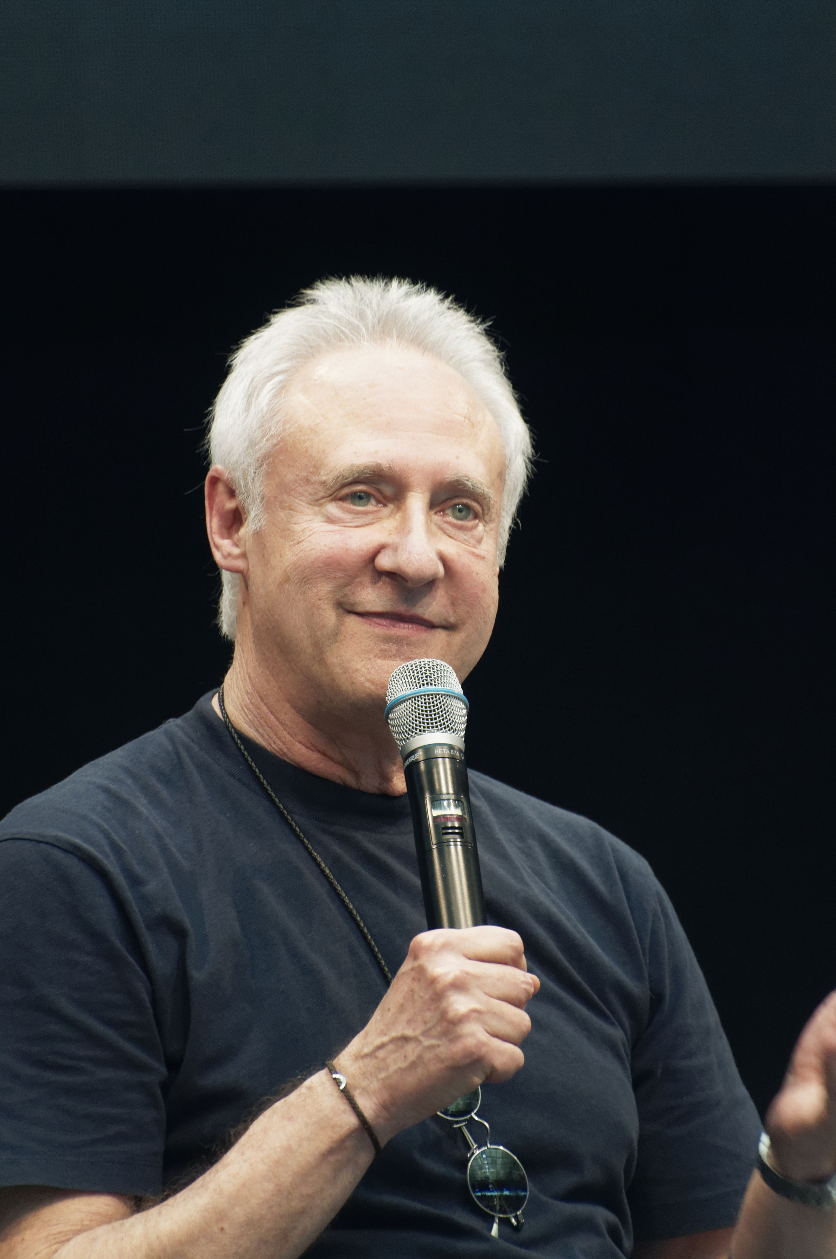 Bilder von der Comic Con Germany 2019 in Stuttgart